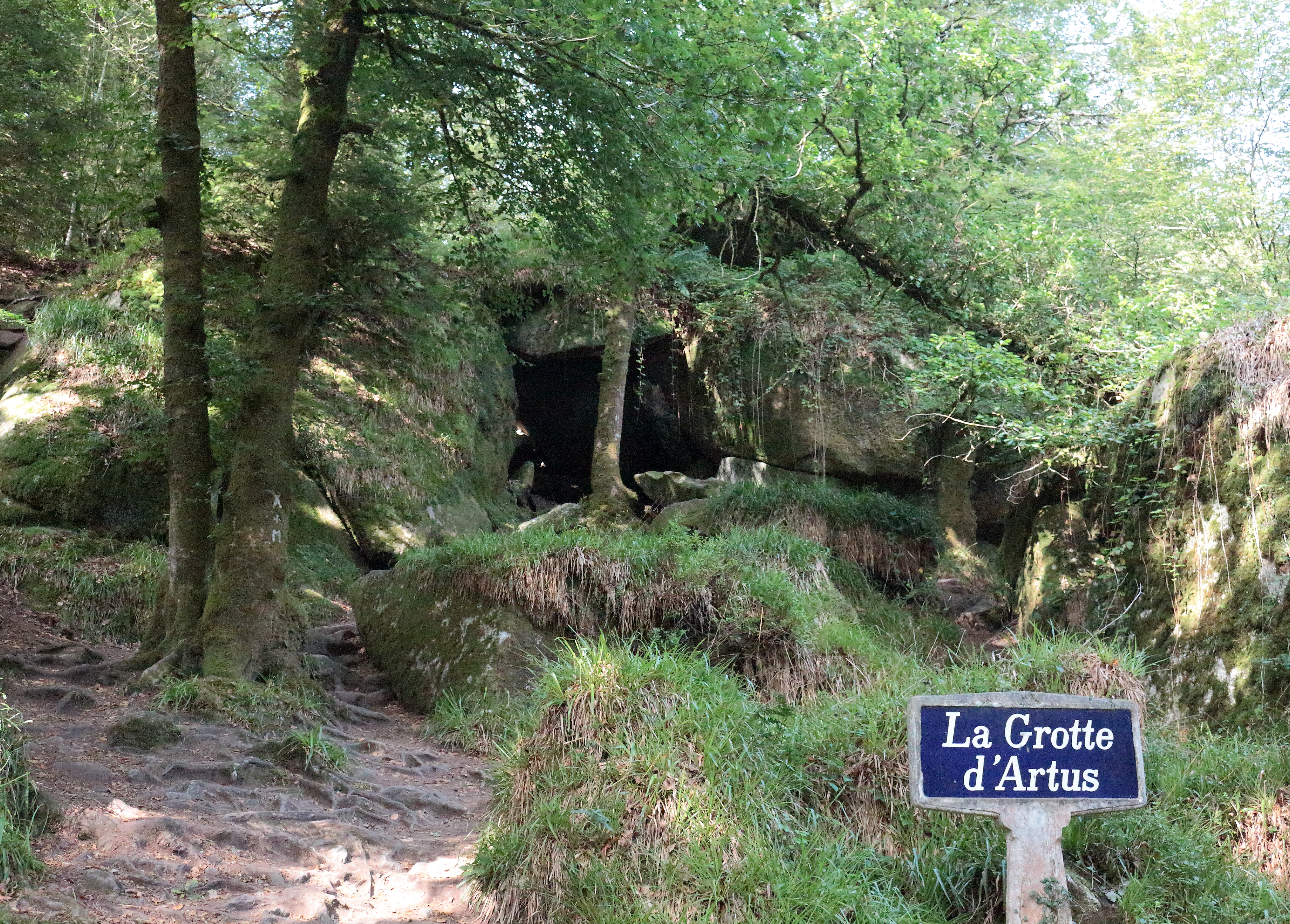 La grotte d'Artus, en forêt d'Huelgoat, Finistère, Bretagne, France.